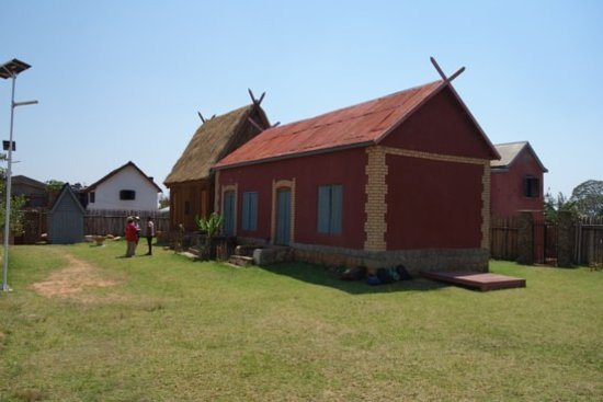 Représentation du palais d'Ambohidratrimo Madagascar